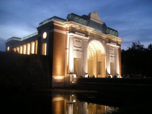 zelfgemaakte afbeelding:menepoort.jpg